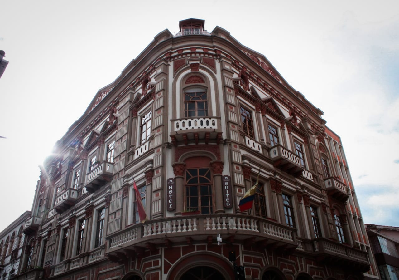 Vista Frontal de Edificio Colonial del Centro de la Ciudad